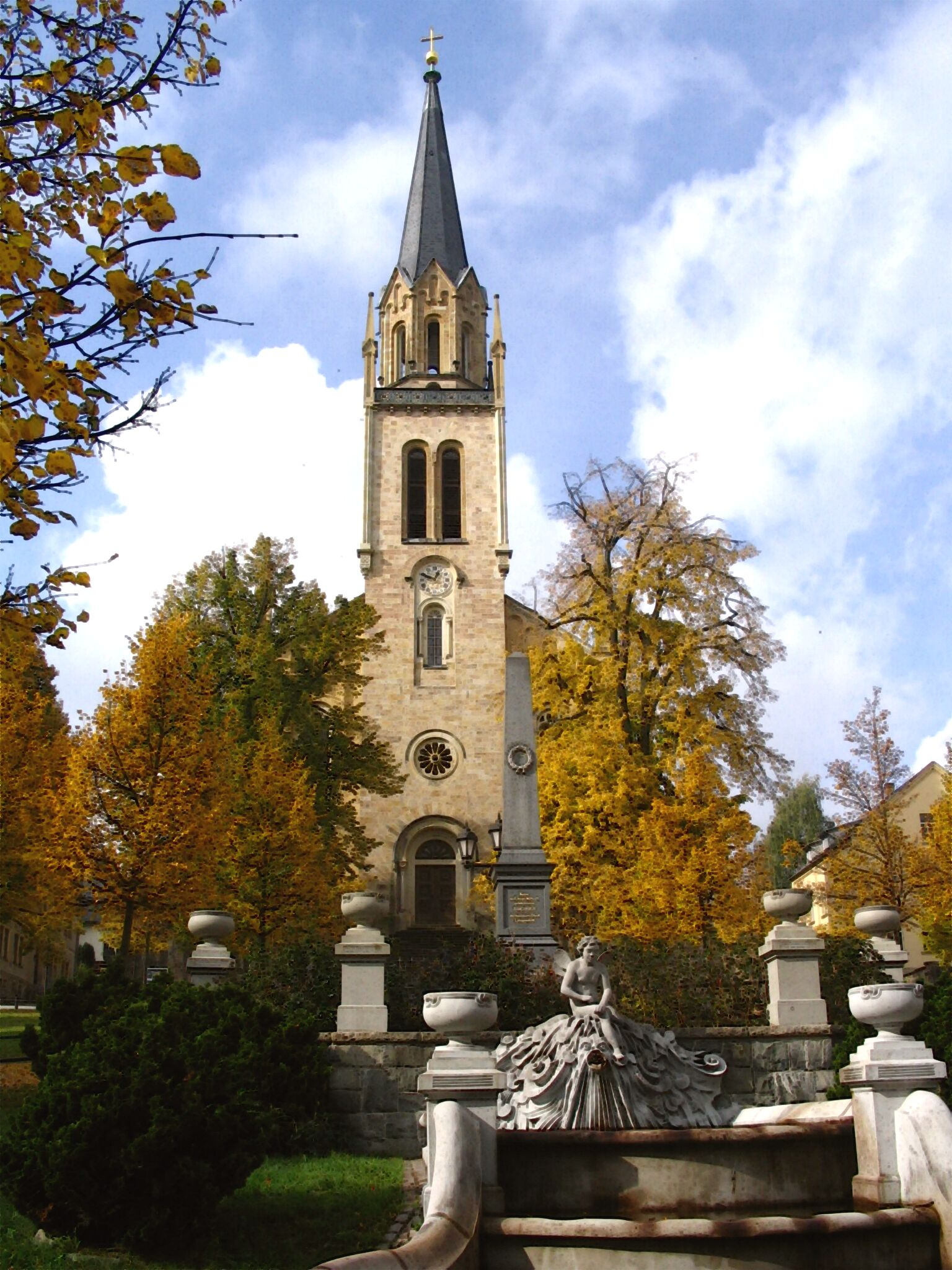 St.-Aegidius-Kirche in Lengenfeld / Vogtland